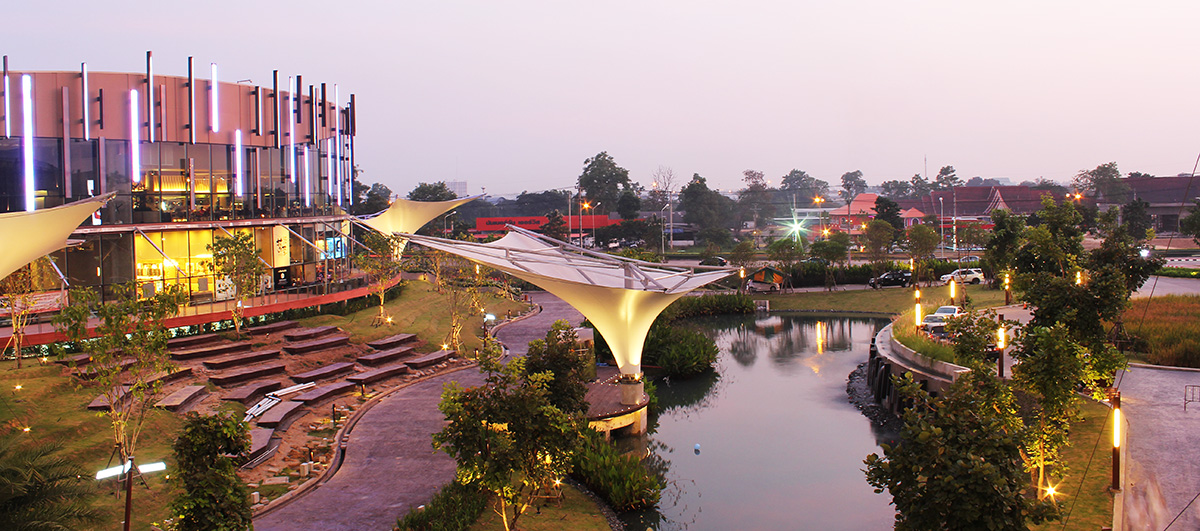 พรอมเมนาดา รีสอร์ทมอลล์ เชียงใหม่